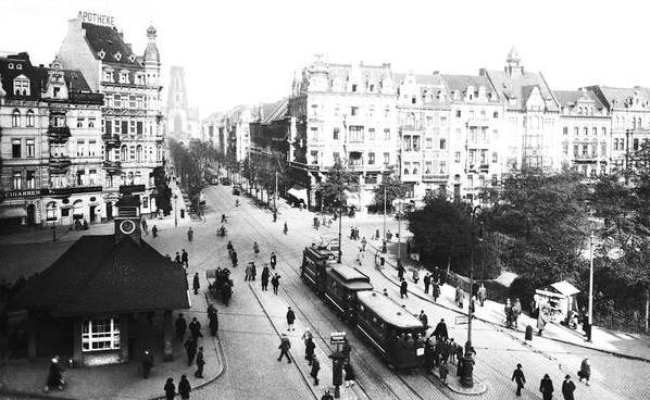 1910 photo of Neusser Straße and Ebertplatz, then Deutscher Platz, Platz der Republik